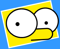 Figuras geométricas, Ojos de homero simpson